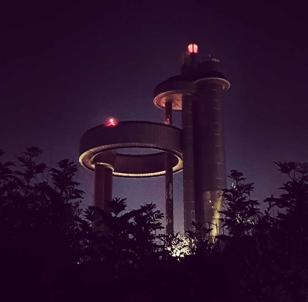 Torre piezometrica del centro idrico Eur visto di notte, le luci sono accese